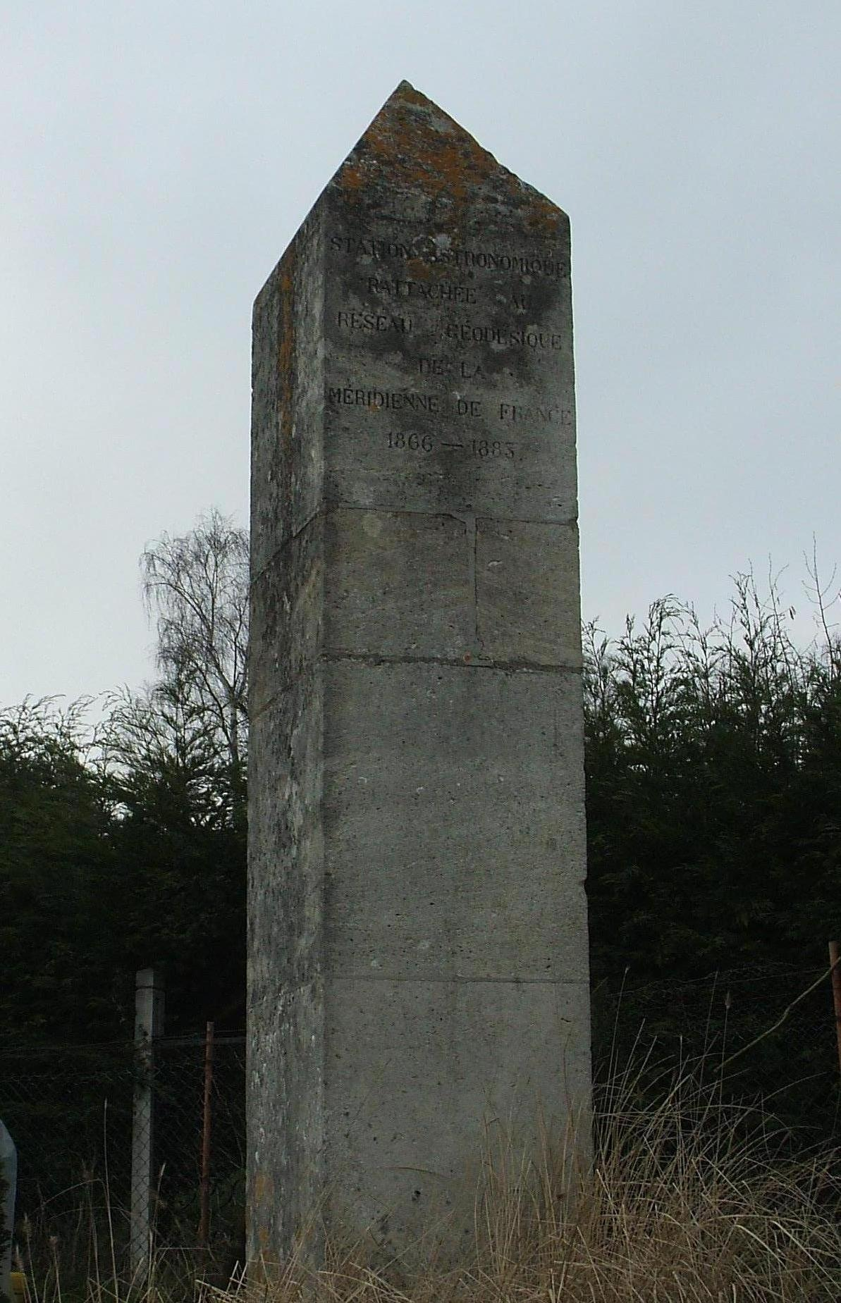 francais:stèle de la méridienne de saint martin du tertre val d'oise france english: Meridian stele of Paris at saint martin du tertre